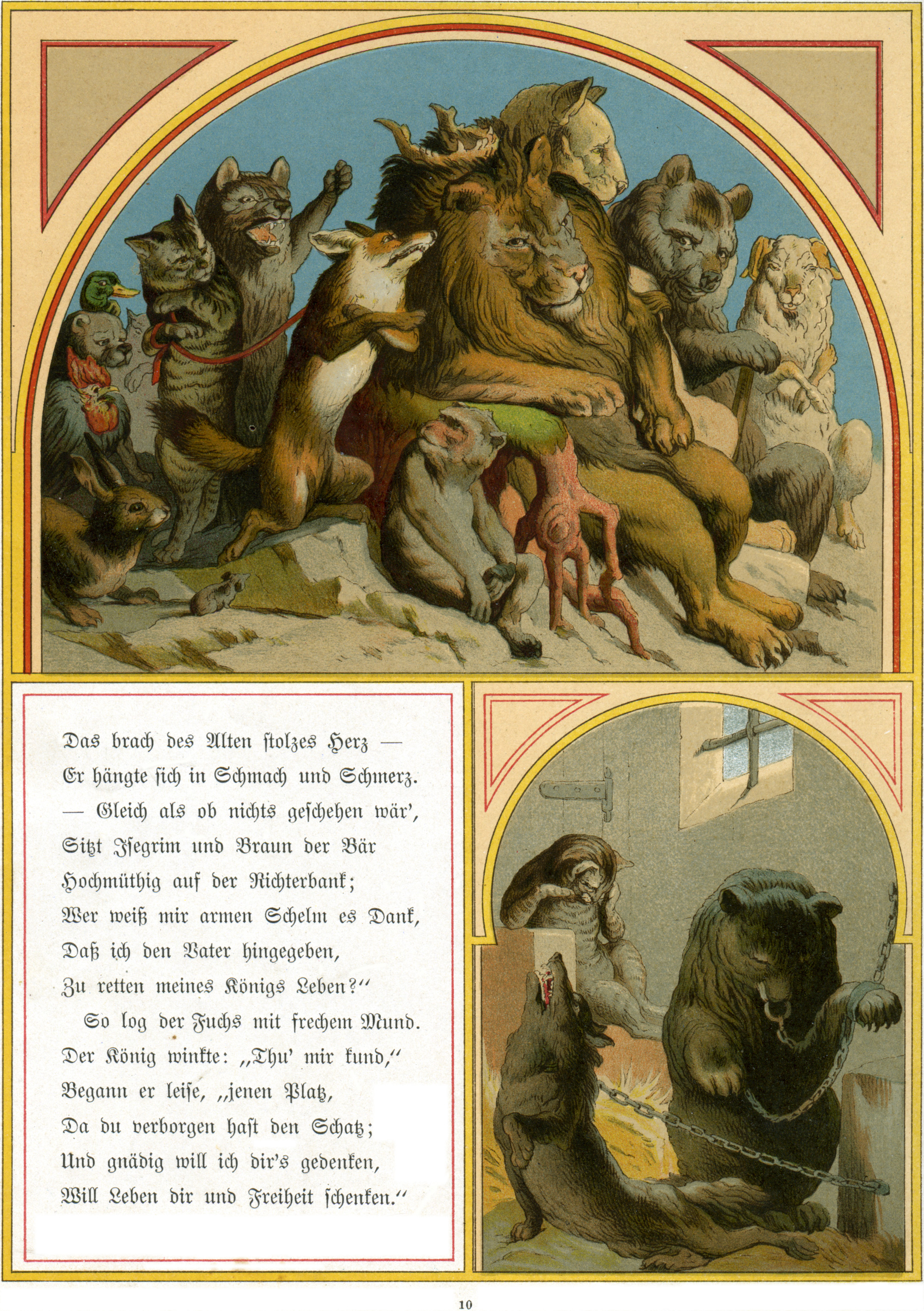 Seite 10A des „Reineke Fuchs“, Ein heiteres Kinderbuch